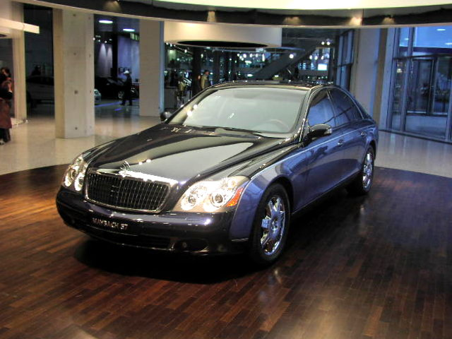 Maybach 57 2006